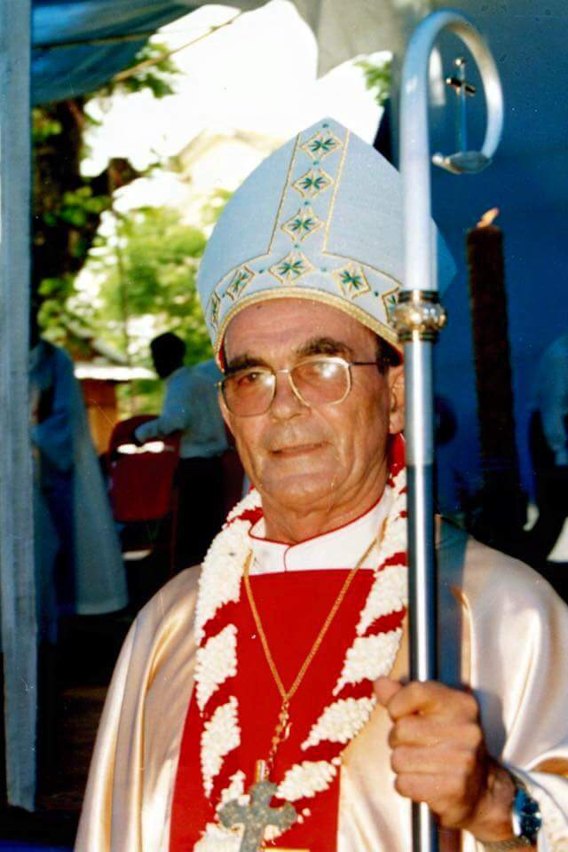 Photo de Mgr Émile Destombes, vicaire apostolique de Phnom Penh, le jour de son ordination épiscopale